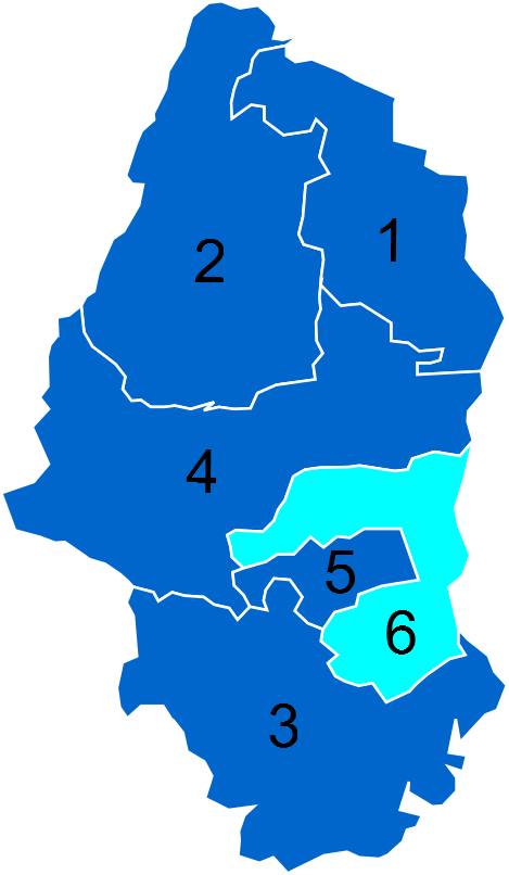 Résultats des élections législatives du Haut-Rhin en 2012